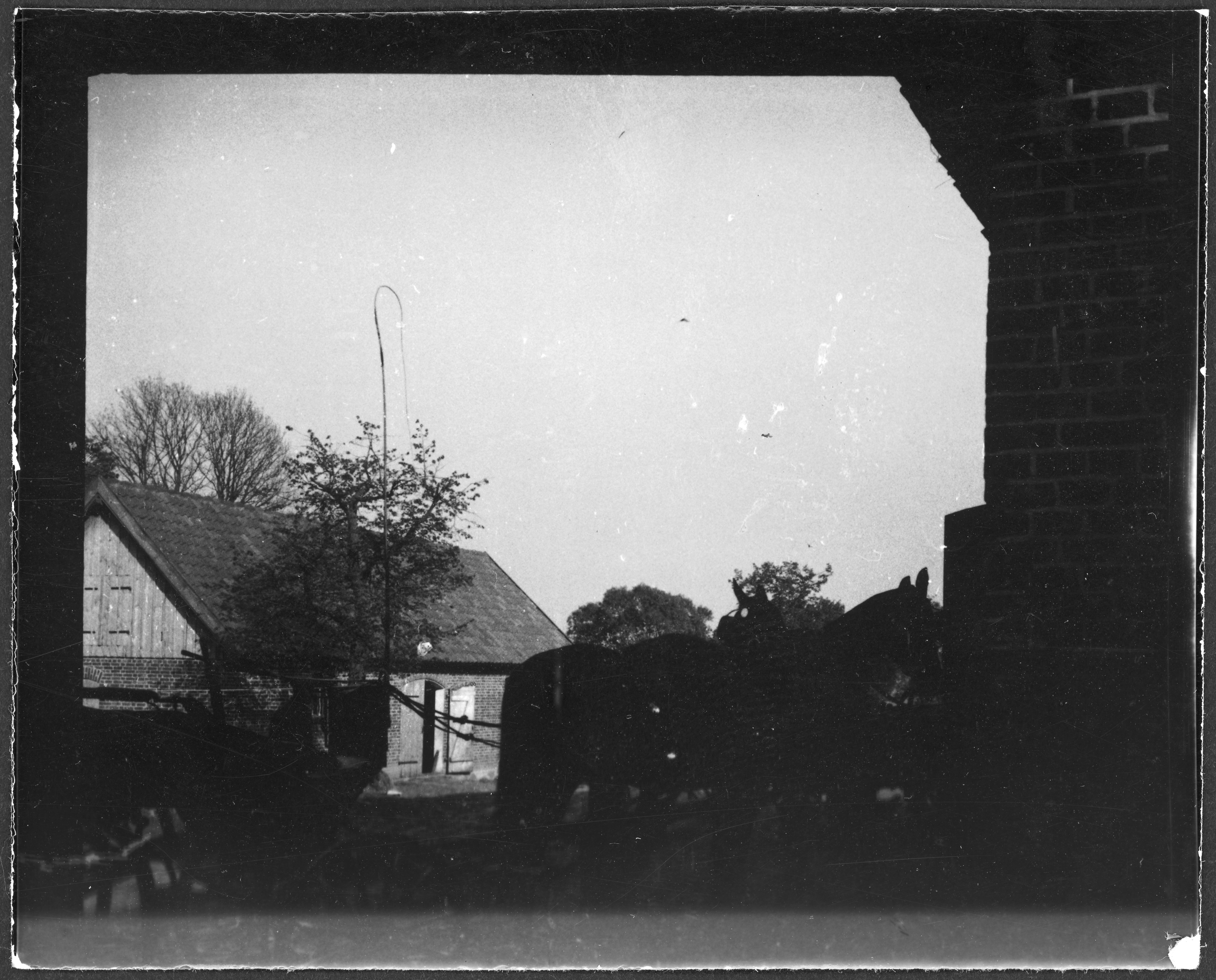 Ostpreussen, Podangen: Gebäude (Lokalisierung unsicher); Pferdegespann vor Haus